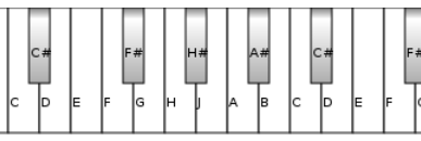 Bohlenpierce clavier